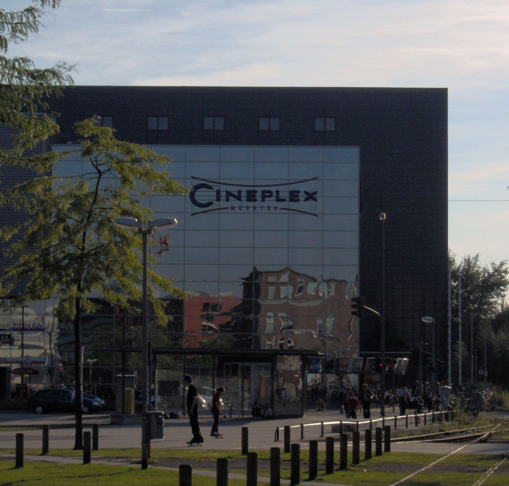 Das Cineplex in Münster